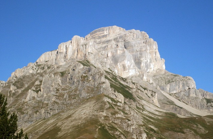 Grande Tête de l'Obiou, face Est. Photo personnelle.